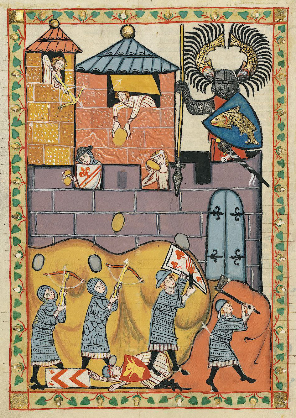 Codex Manesse, UB Heidelberg, Cod. Pal. germ. 848, fol. 229v: Der Düring